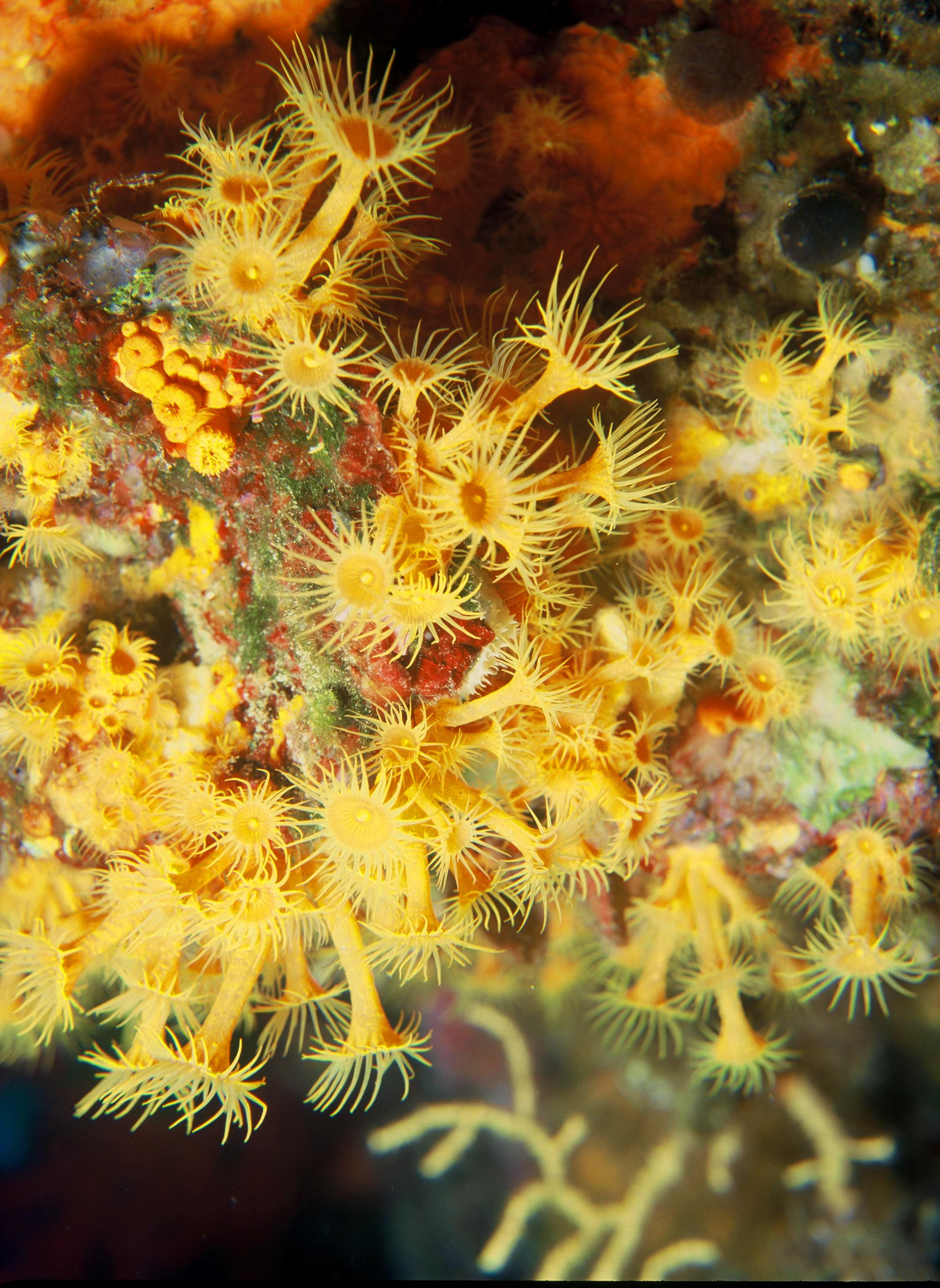 {InformationParazoanthus axinellae